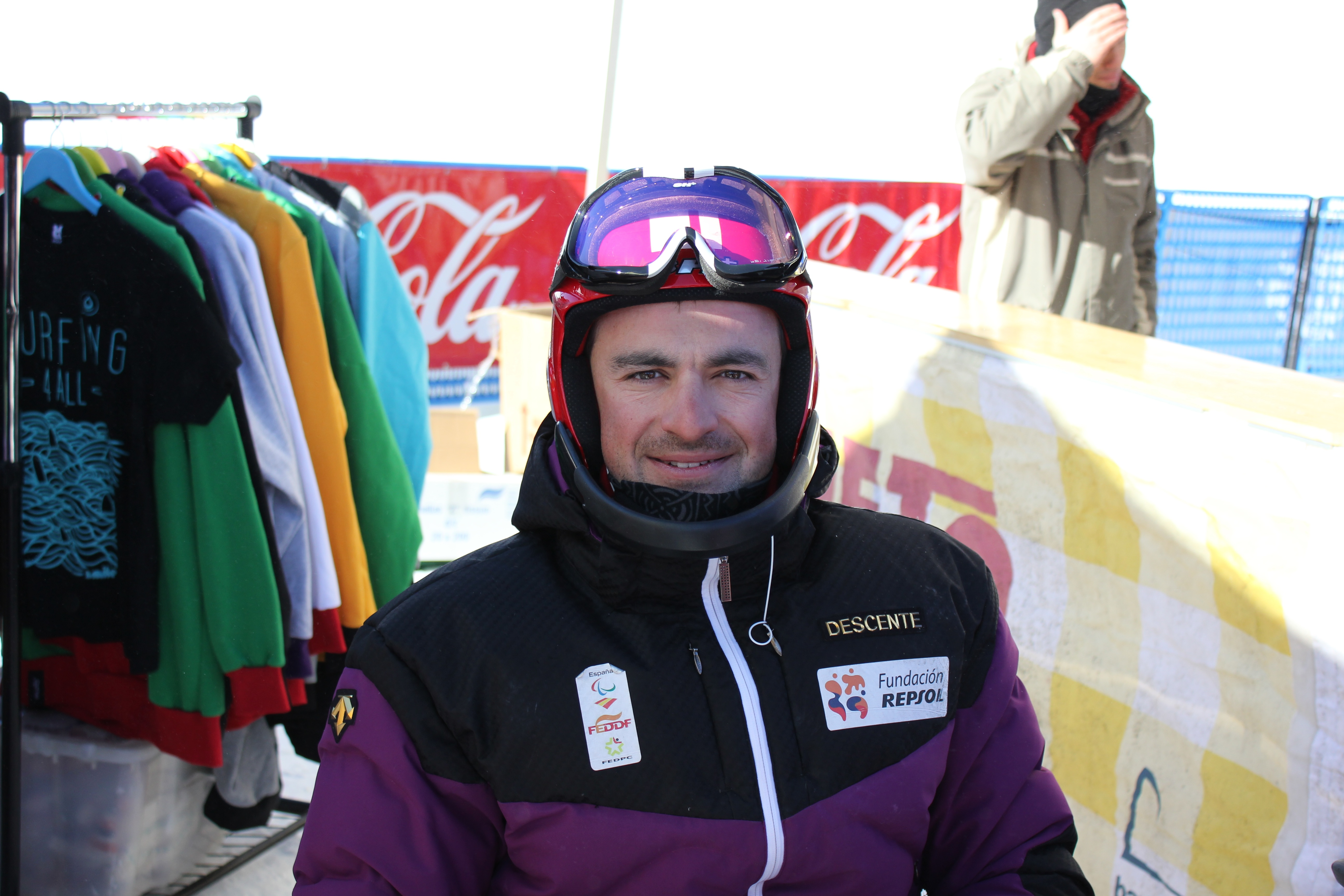 El español Óscar Espallargas, esquiador alpino paralímpica, en el Campeonato del Mundo IPC 2013 de esquí alpino celebrado en La Molina, España.